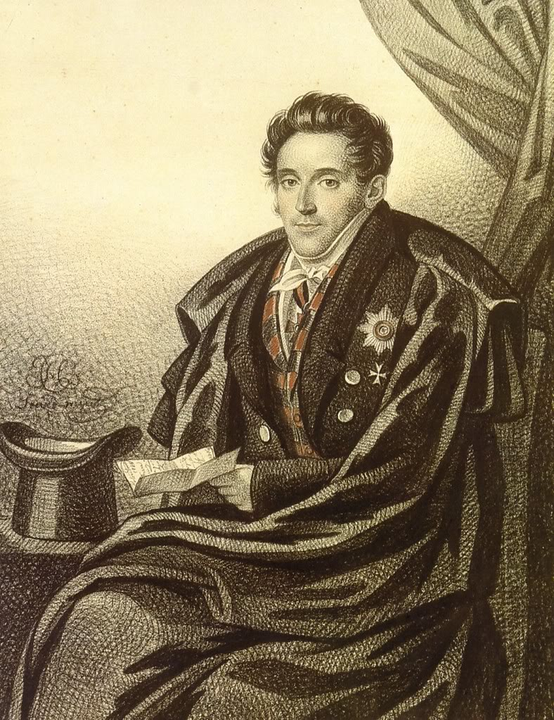 Константин Яковлевич Булгаков (1782-1835)